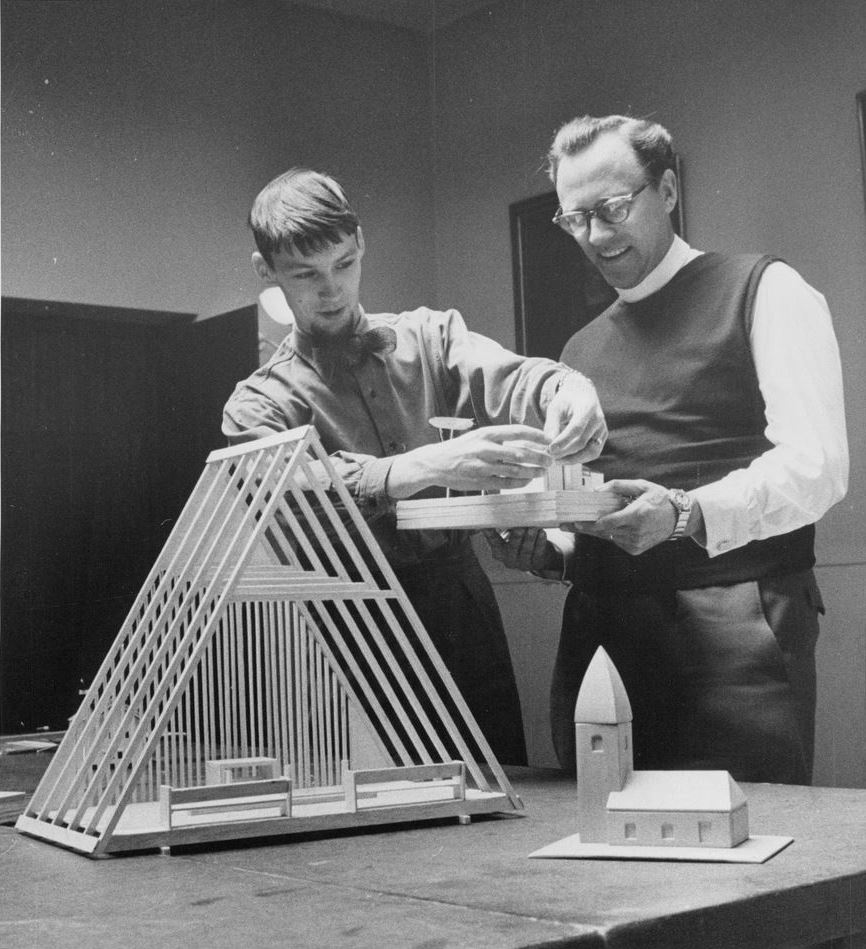 Ingemar Goliath (född 1931), svensk arkitekt, och Lars Ridderstedt (1924-2009), svensk präst.